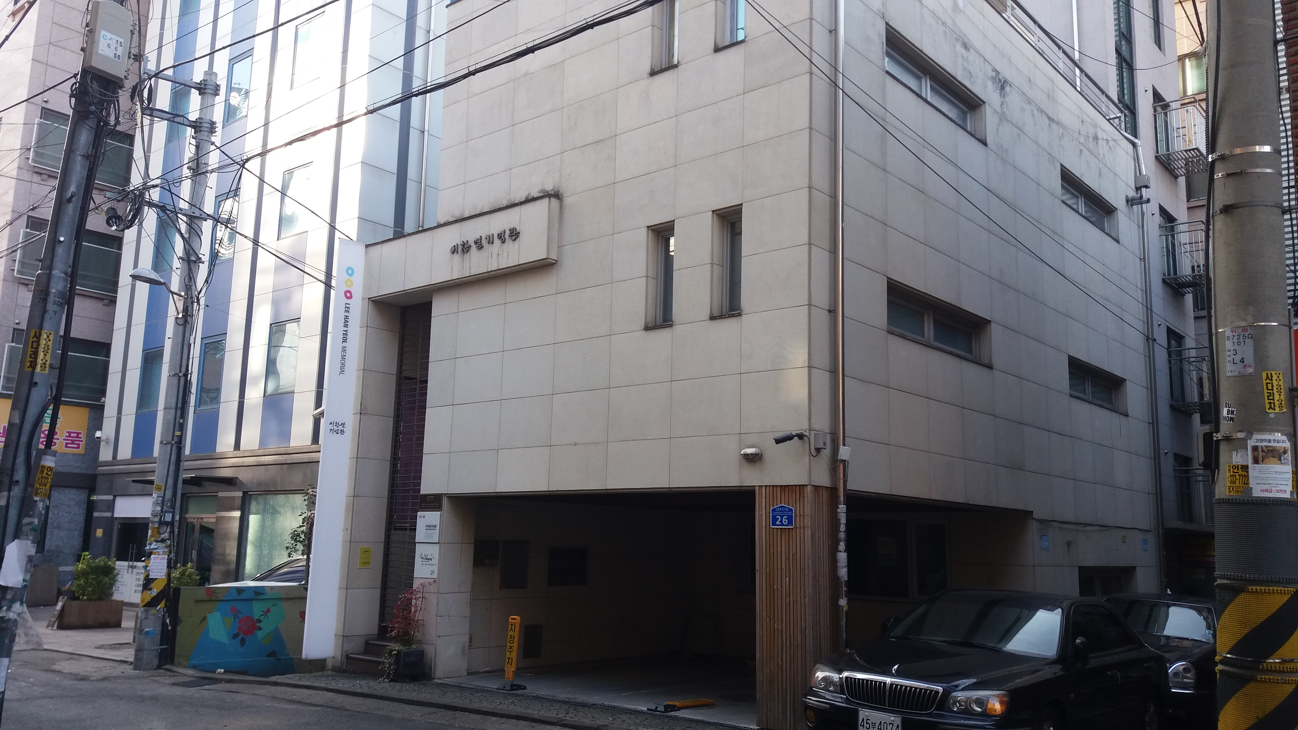 이한열기념관